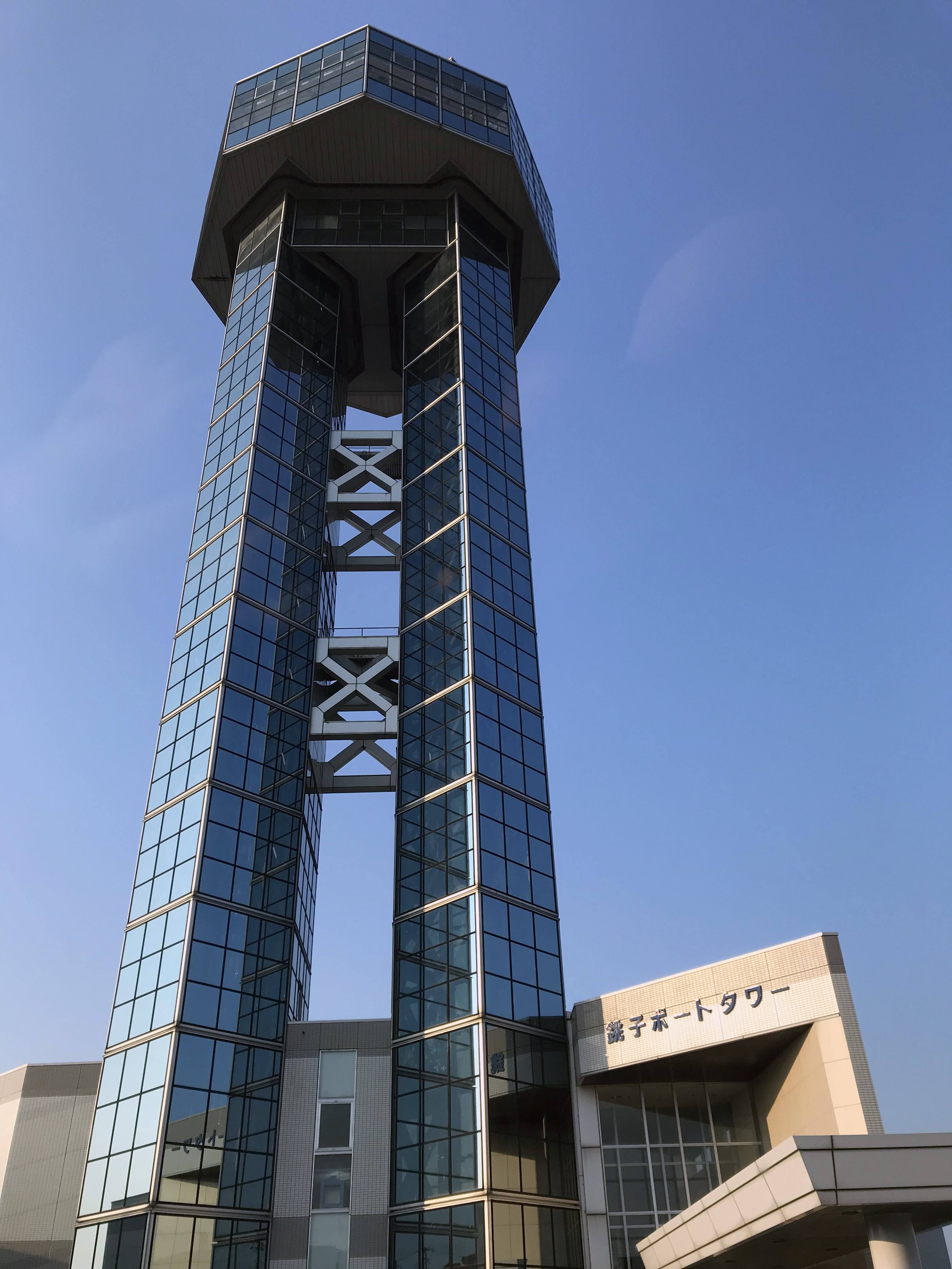 銚子ポートタワー（2018年6月撮影）